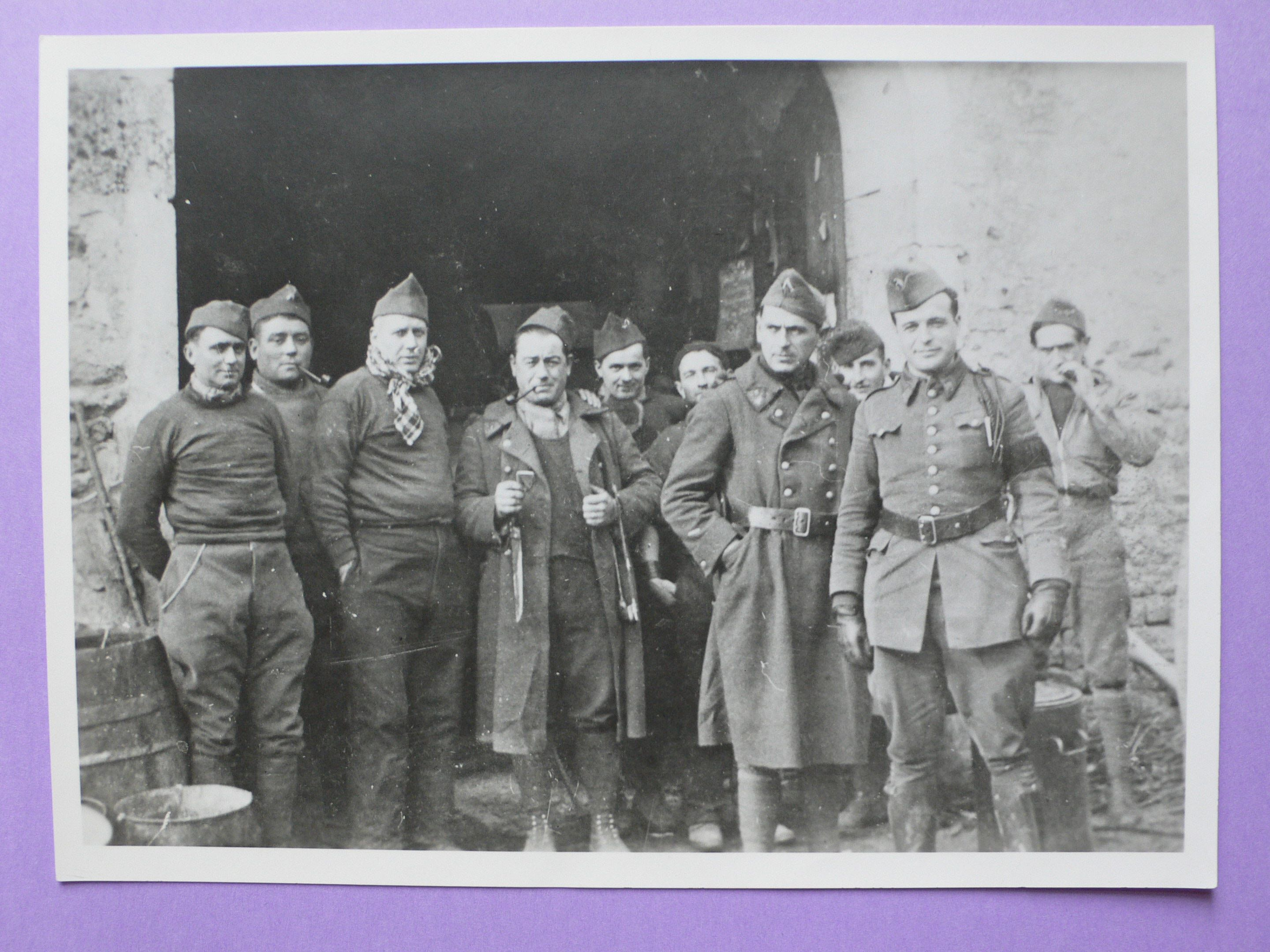 Section d'infanterie commandée par Cavaillès en 1939, devant le porche d'une ferme lorraine